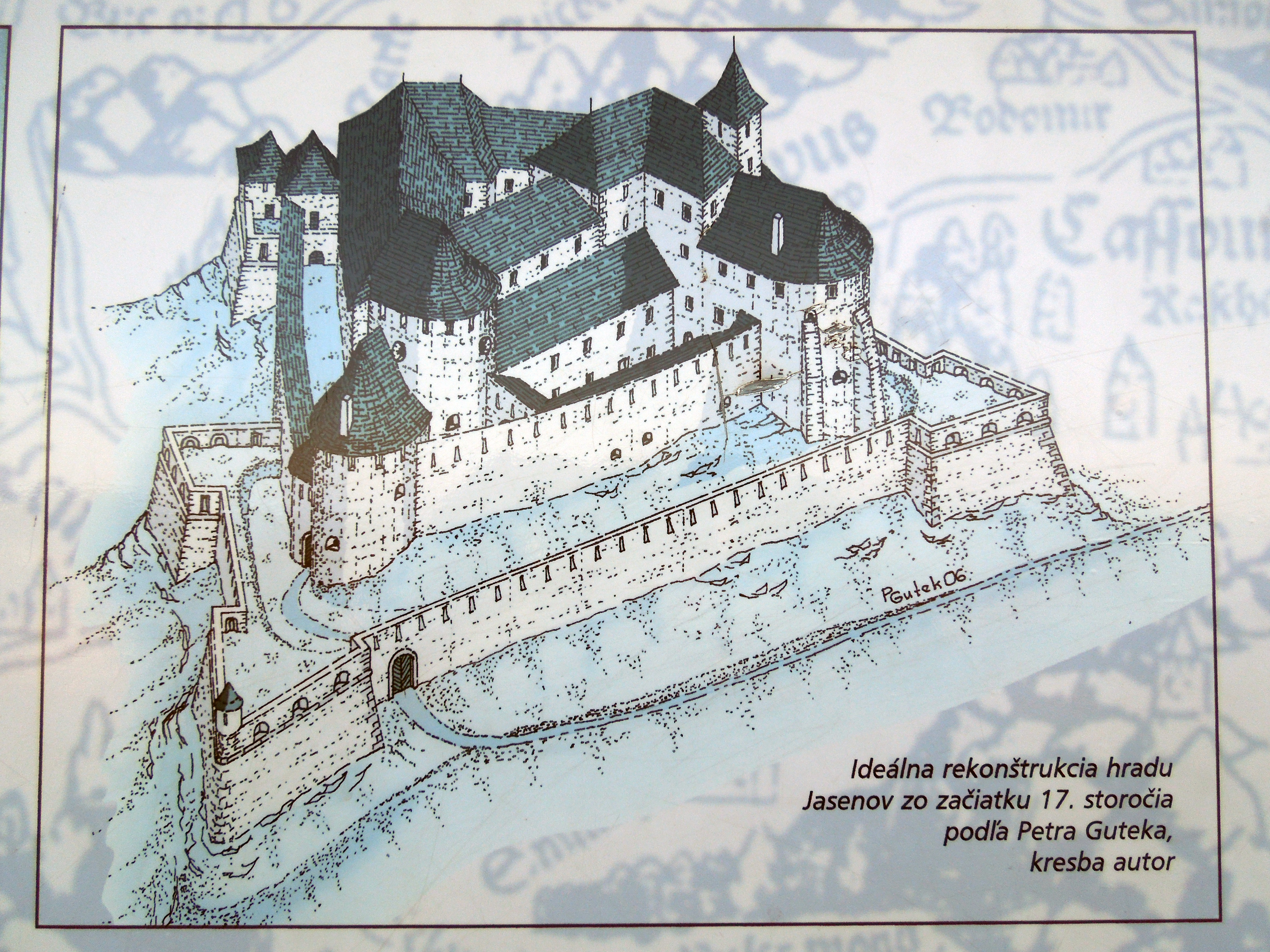 Ideálna rekonštrukcia hradu Jasenov zo začiatku 17. storočia podľa Petra Guteka, kresba autor